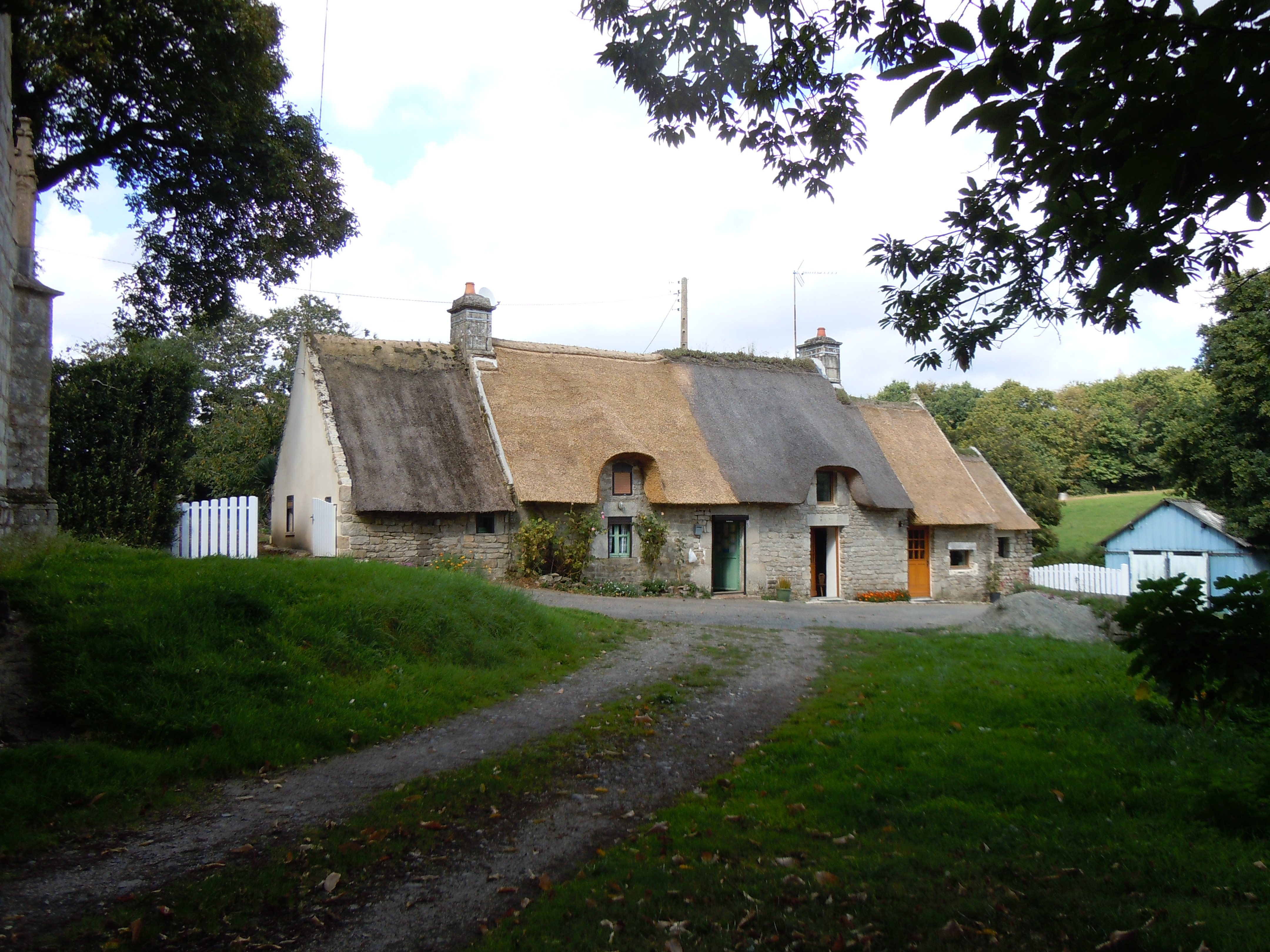 chaumières du village de Saint Eloi, commune de Guiligomarc'h, département du Finistère, France